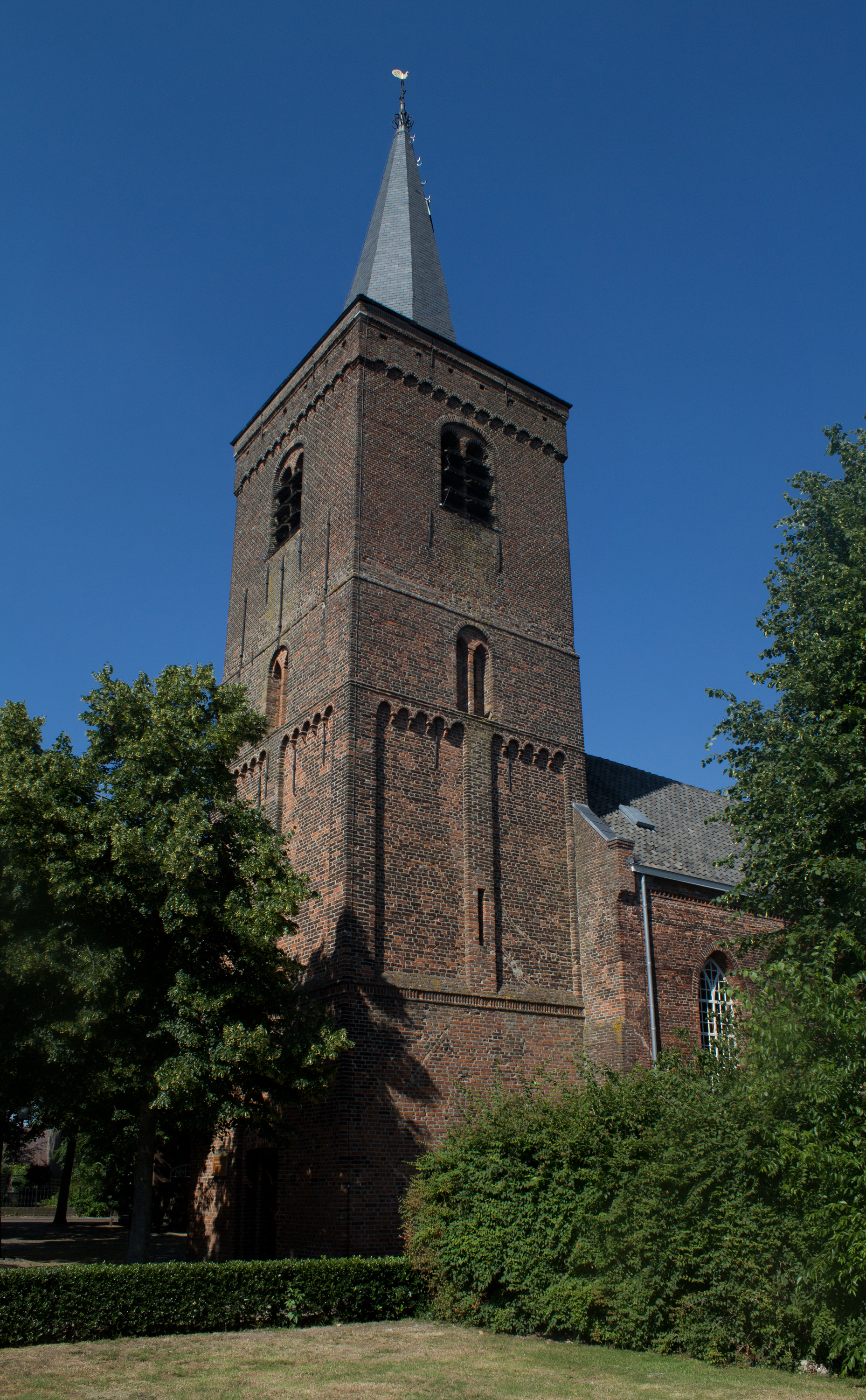 Toren van de Nederlands Hervormde Kerk